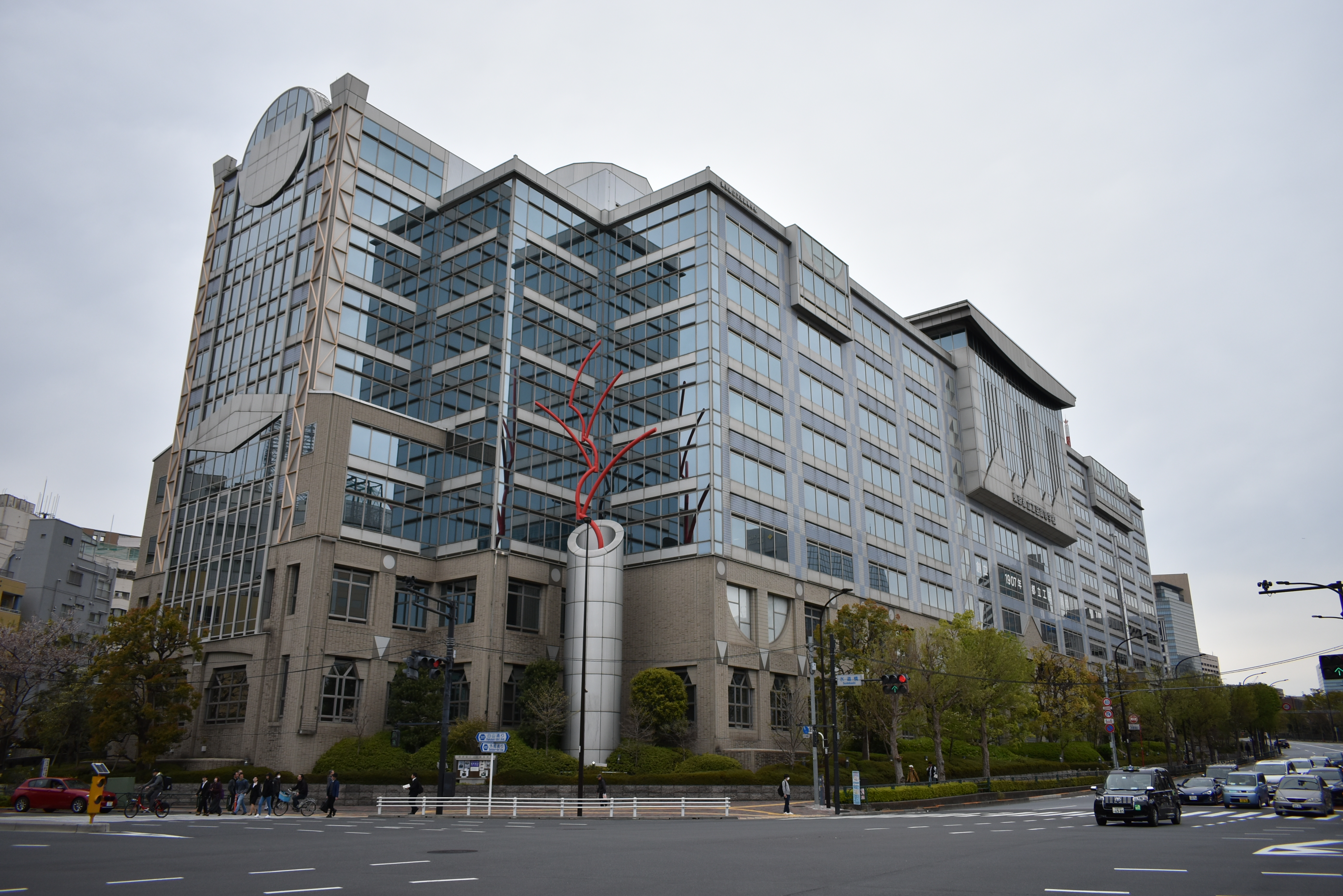 東京都立工芸高等学校 Nikon D3400